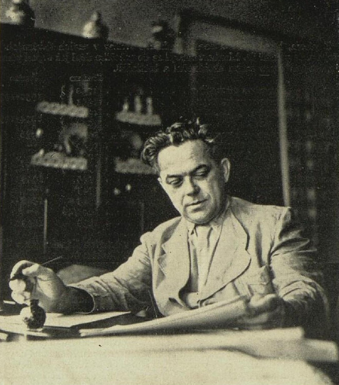 Oldřich Menhart (1897-1962), český typograf, tvůrce písma, kaligraf, knižní grafik a odborný publicista